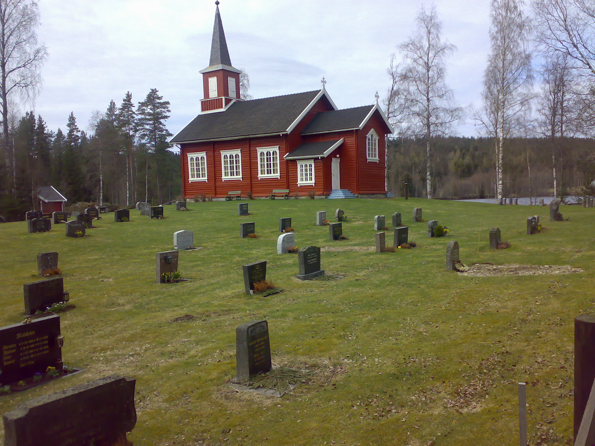 Mangen kapell, nord for mangensjøen